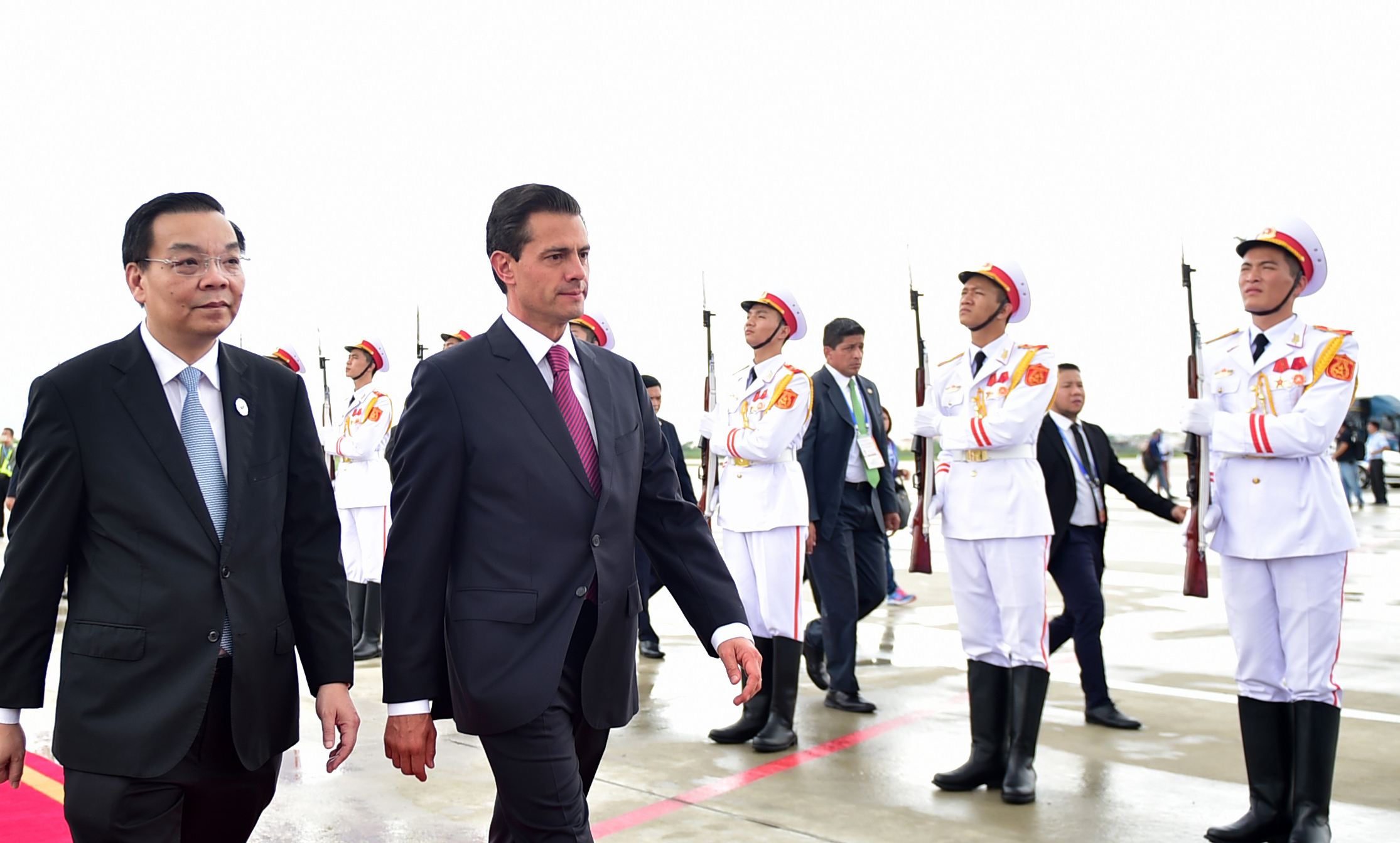 El Presidente Enrique Peña Nieto arribó a Da Nang, Vietnam, en donde participará en la Reunión de Líderes Económicos del Foro de Cooperación Económica Asia-Pacífico.